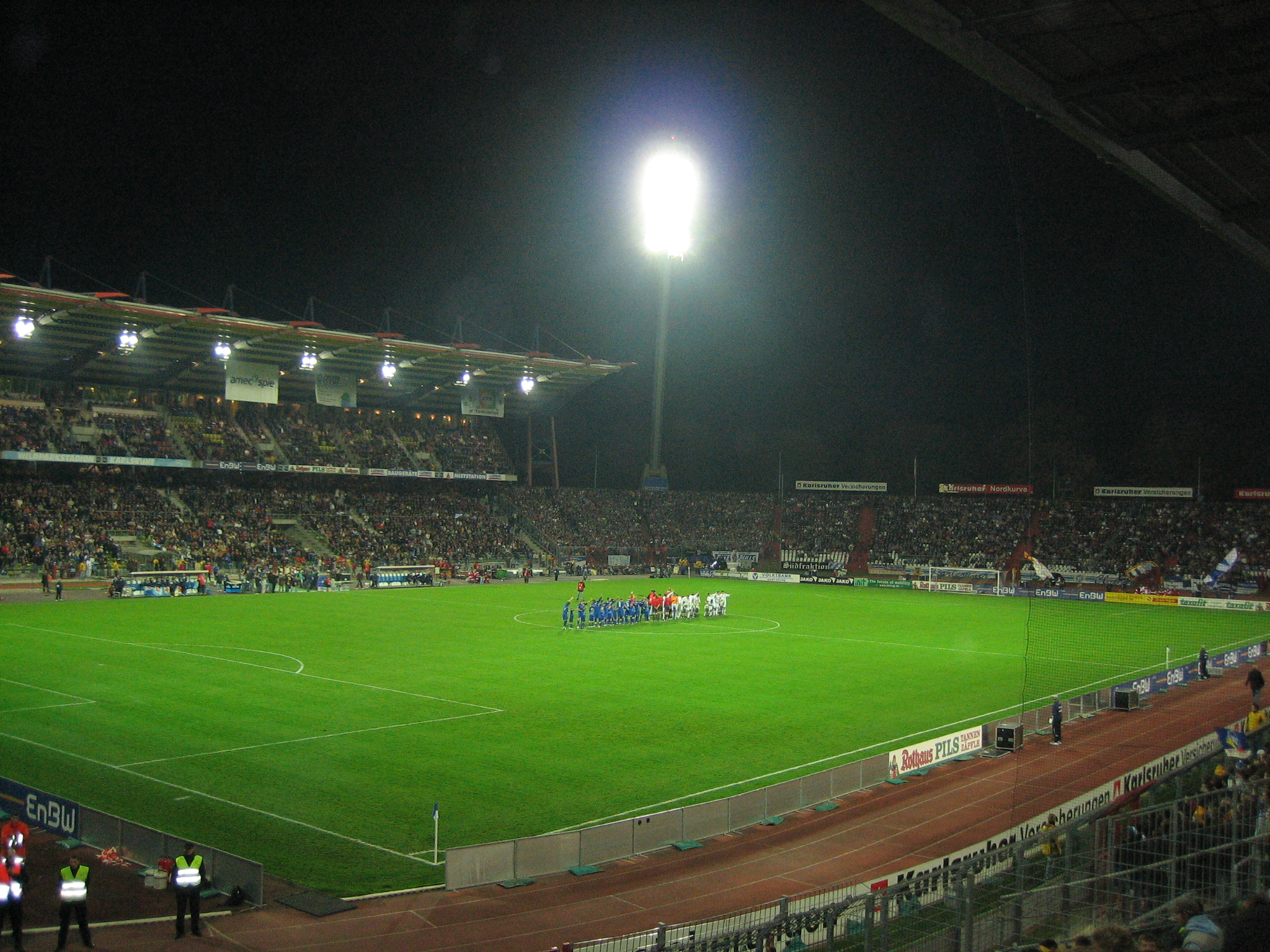 Wildparkstadion. Begrüßung der Mannschaften vor dem Spiel KSC vs. FC Hansa Rostock. (KSC in weiß; FC Hansa in blau)